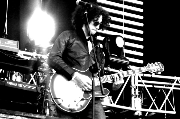 Amílcar Vázquez playing at Pepsi Rock 2007